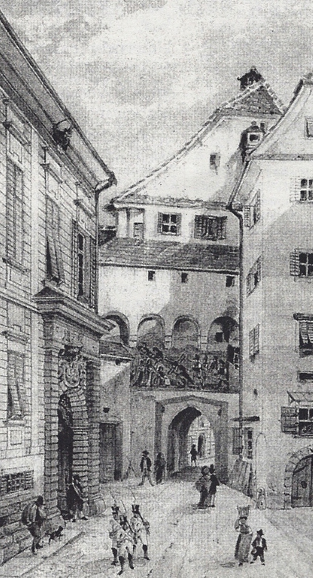 Ehemaliges Inneres Paulustor in der Sporgasse, Graz.